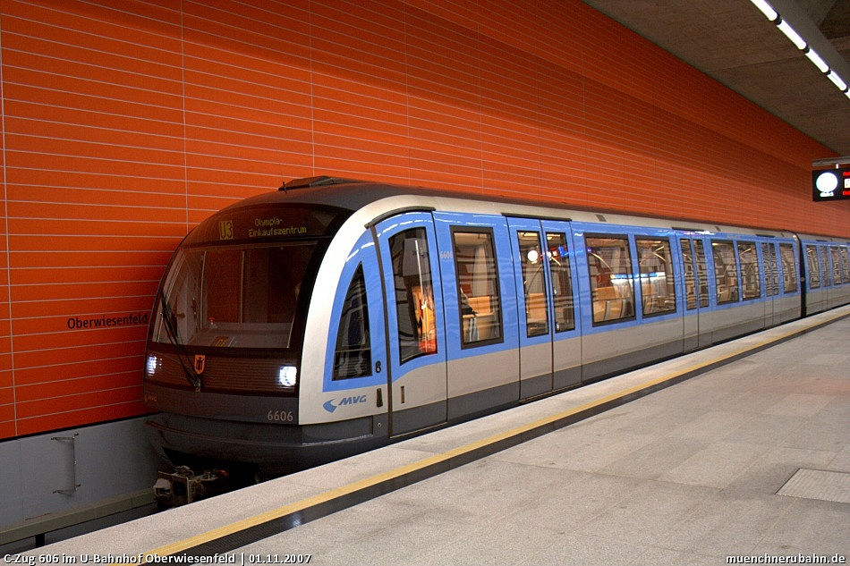 Un treno della metropolitana di Monaco